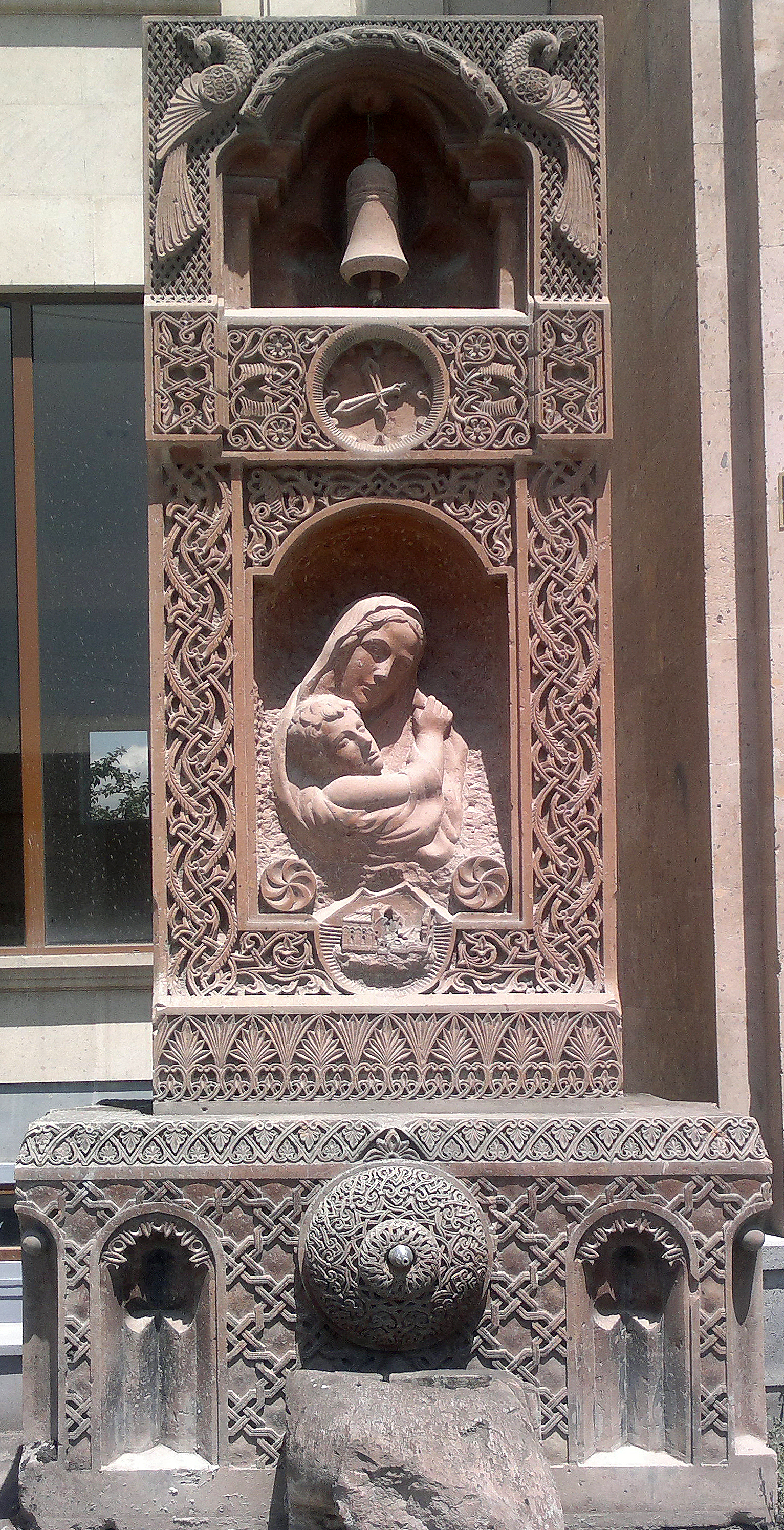 Երկրաշարժի զոհերի հուշարձան